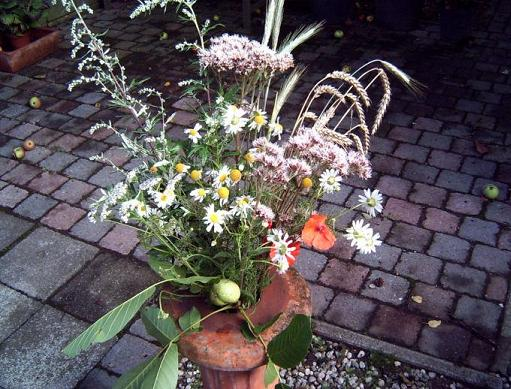 Limburgs: Kroedwösj